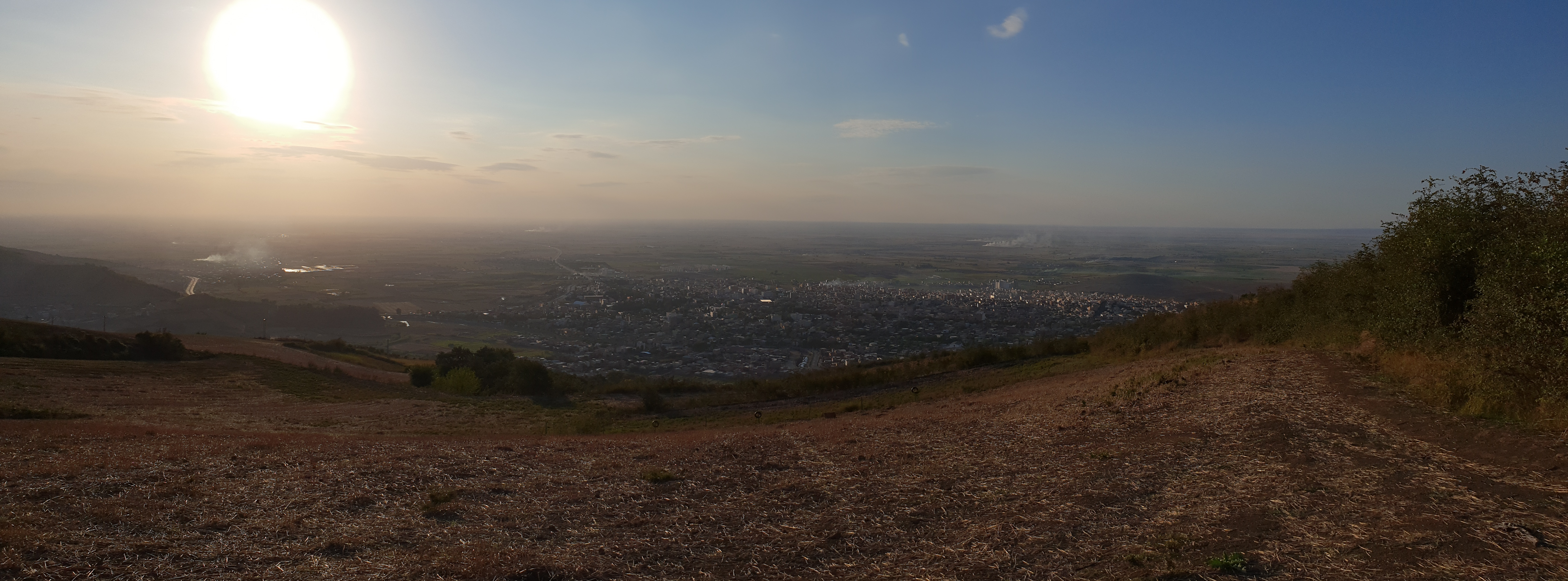 سراسرنمایی از شهر مینودشت